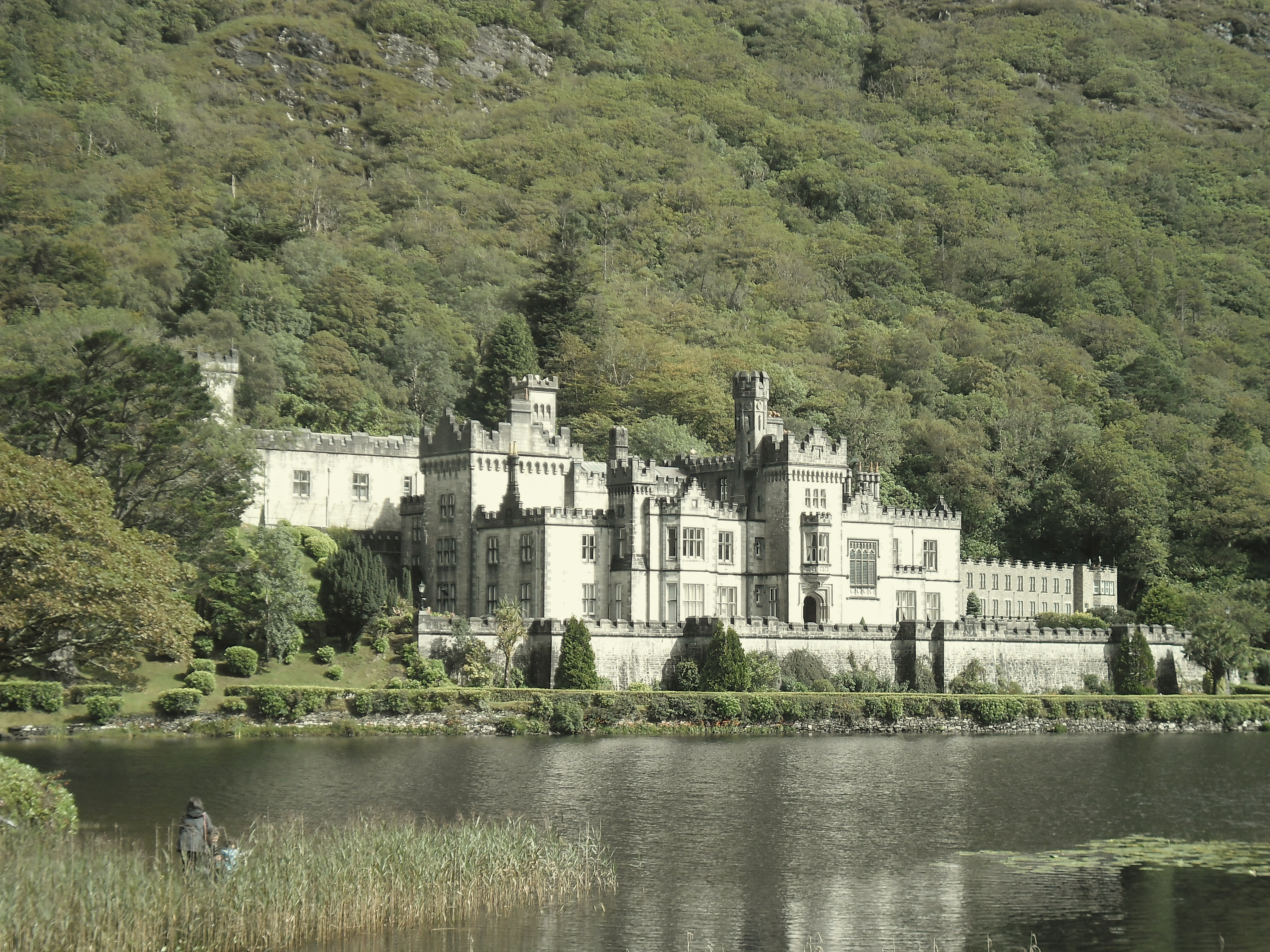 Abbaye de Kylemore, Connemara, Comté de Galway, Irlande